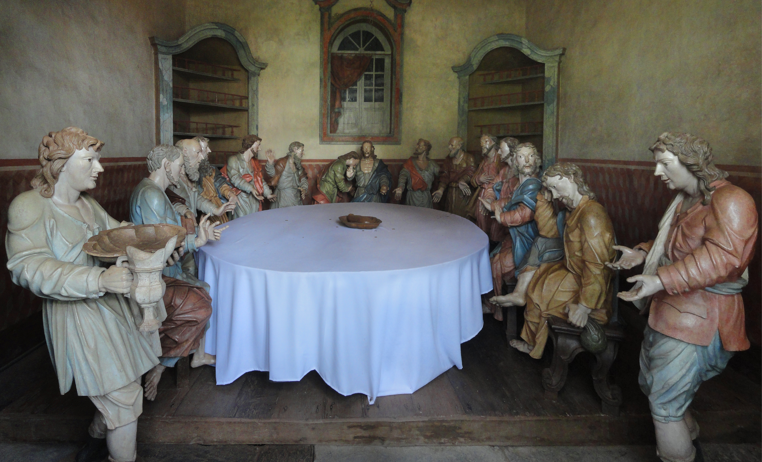 Santuário de Bom Jesus de Matozinhos: conjunto arquitetônico, paisagístico e escultórico. Aleijadinho: A última Ceia